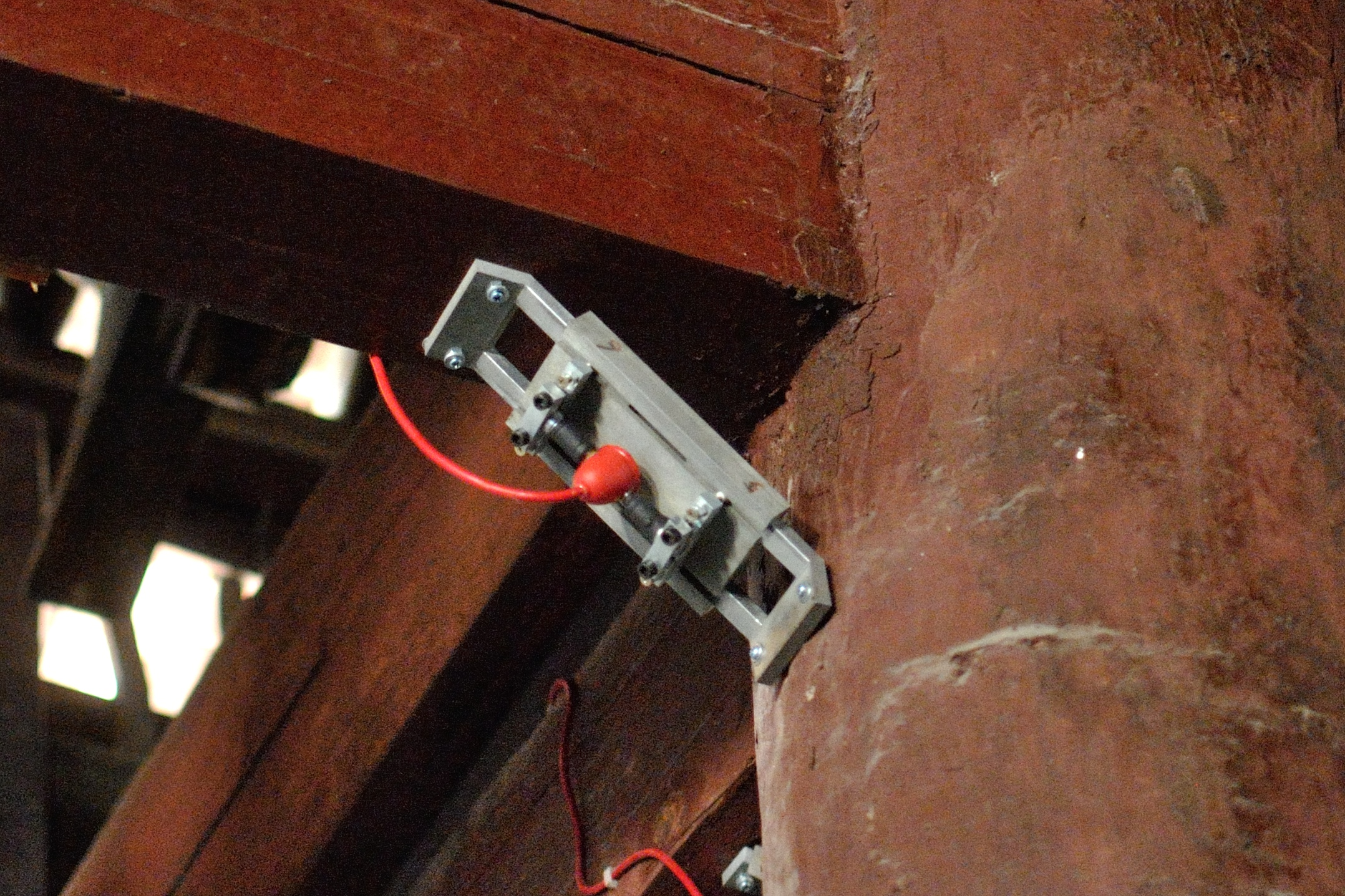 保国寺大殿内的电子监控设备